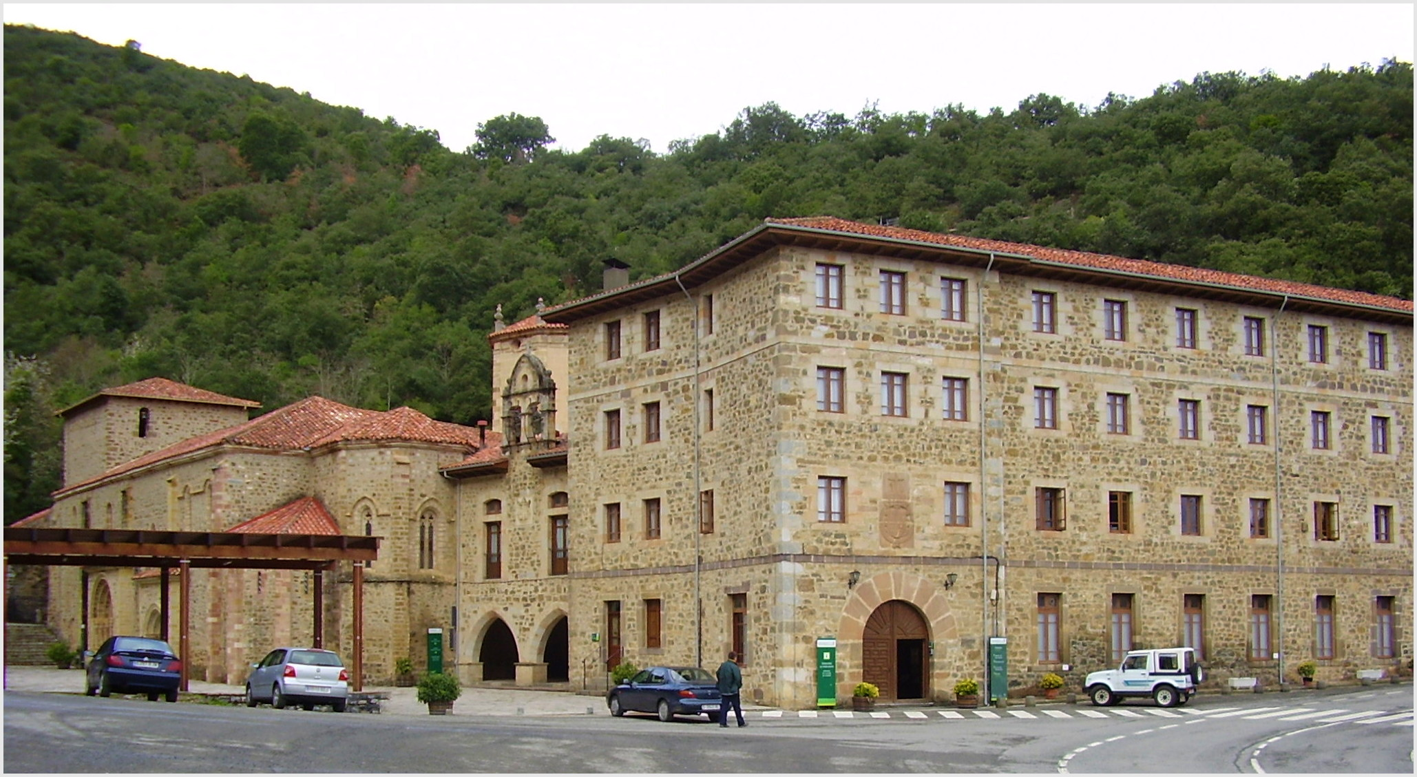 Monastery of Santo Toribio de Liébana, Cantabria, Spain